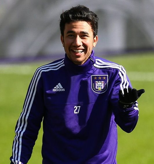 Махмуд Хассан "Трезеге" - футболіст ФК Андерлехта